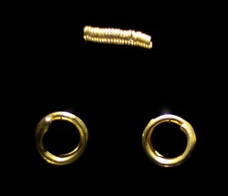 Goldschmuck aus dem Fürstengrab von Leubingen. Exponat der Dauerausstellung im Landesmuseum Halle mit frdl. Genehmigung des Museums aufgenommen.